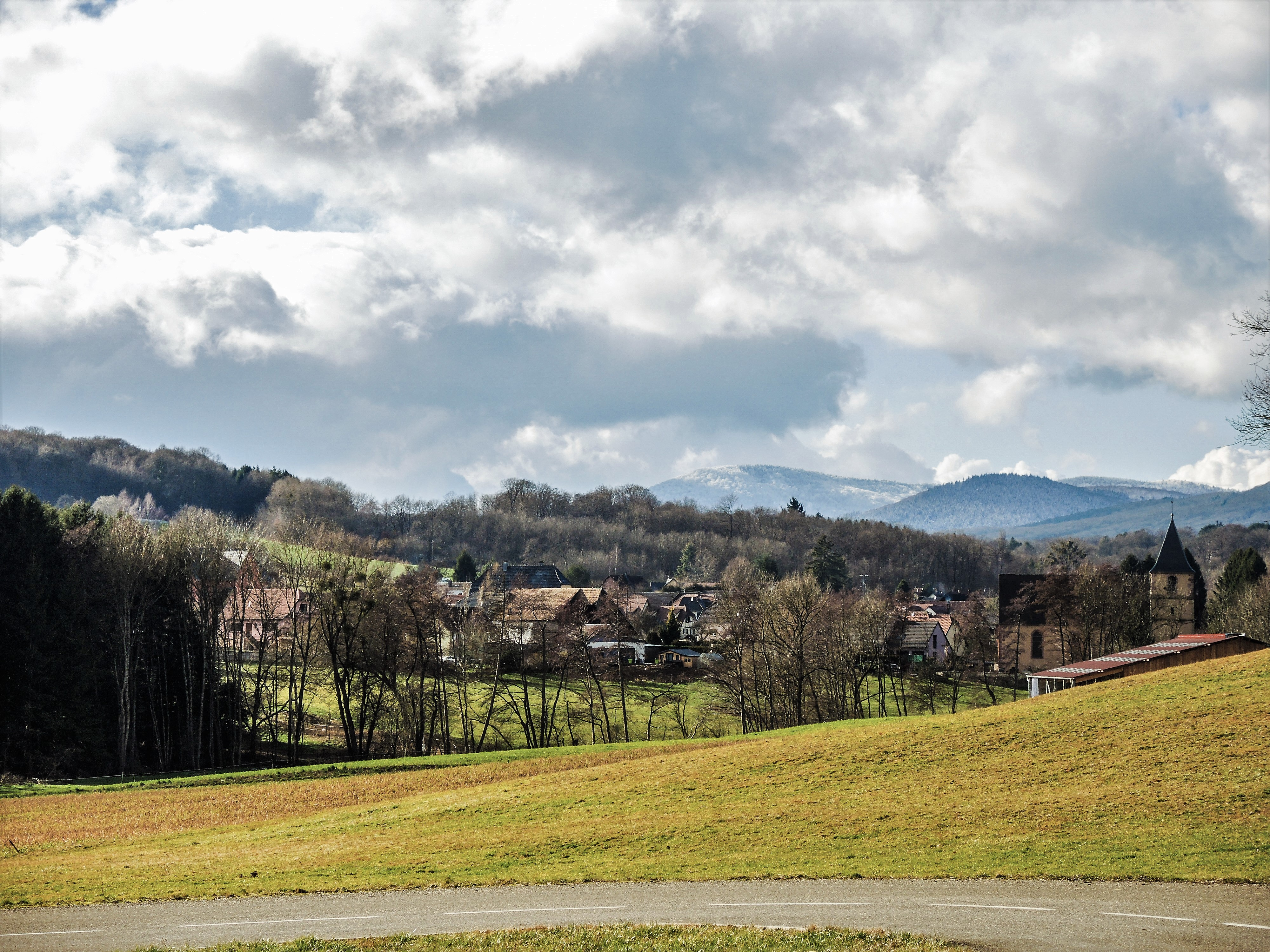 Mortzwiller,, vu de la route Soppe-le-Haut-Guewenheim. Haut-Soulzbach. Haut-Rhin.